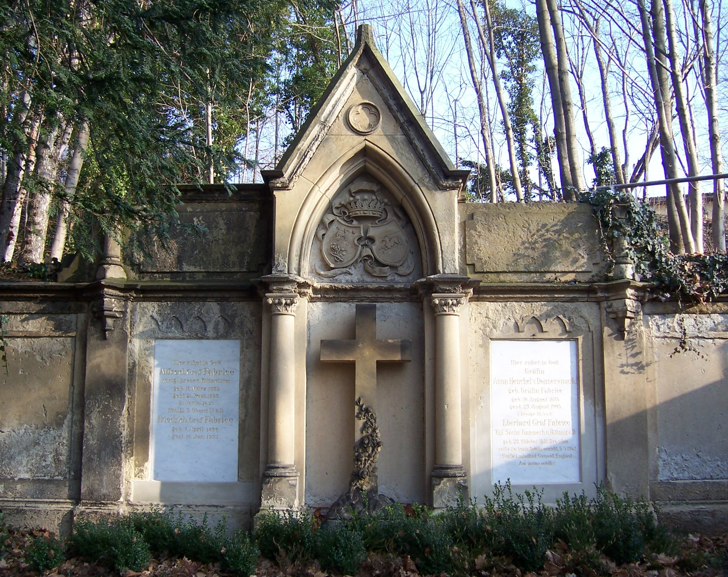 Grab des Generals und Politikers Alfred von Fabrice auf dem St.-Pauli-Friedhof in Dresden